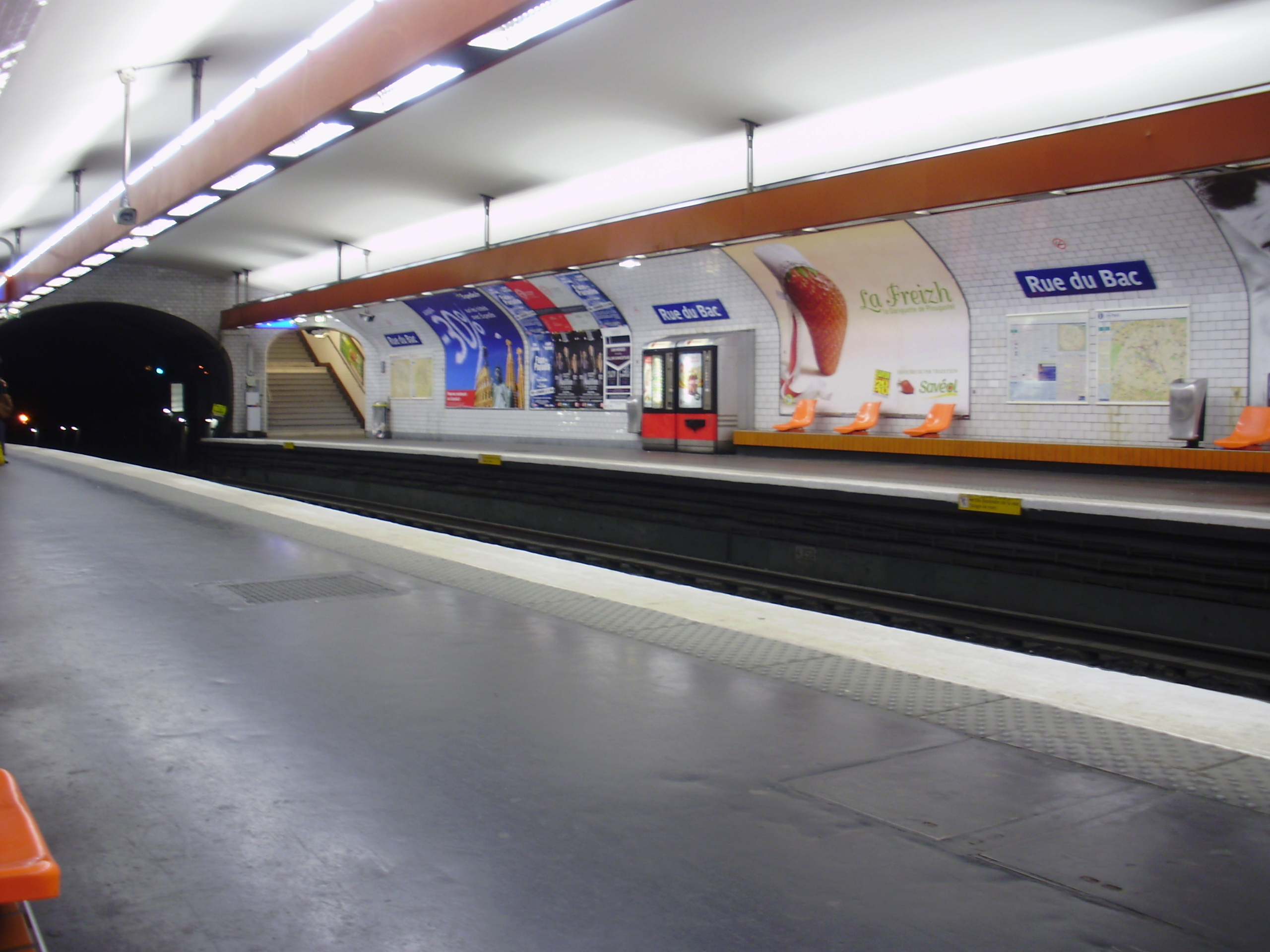 Quais de la station Rue du Bac du métro de Paris